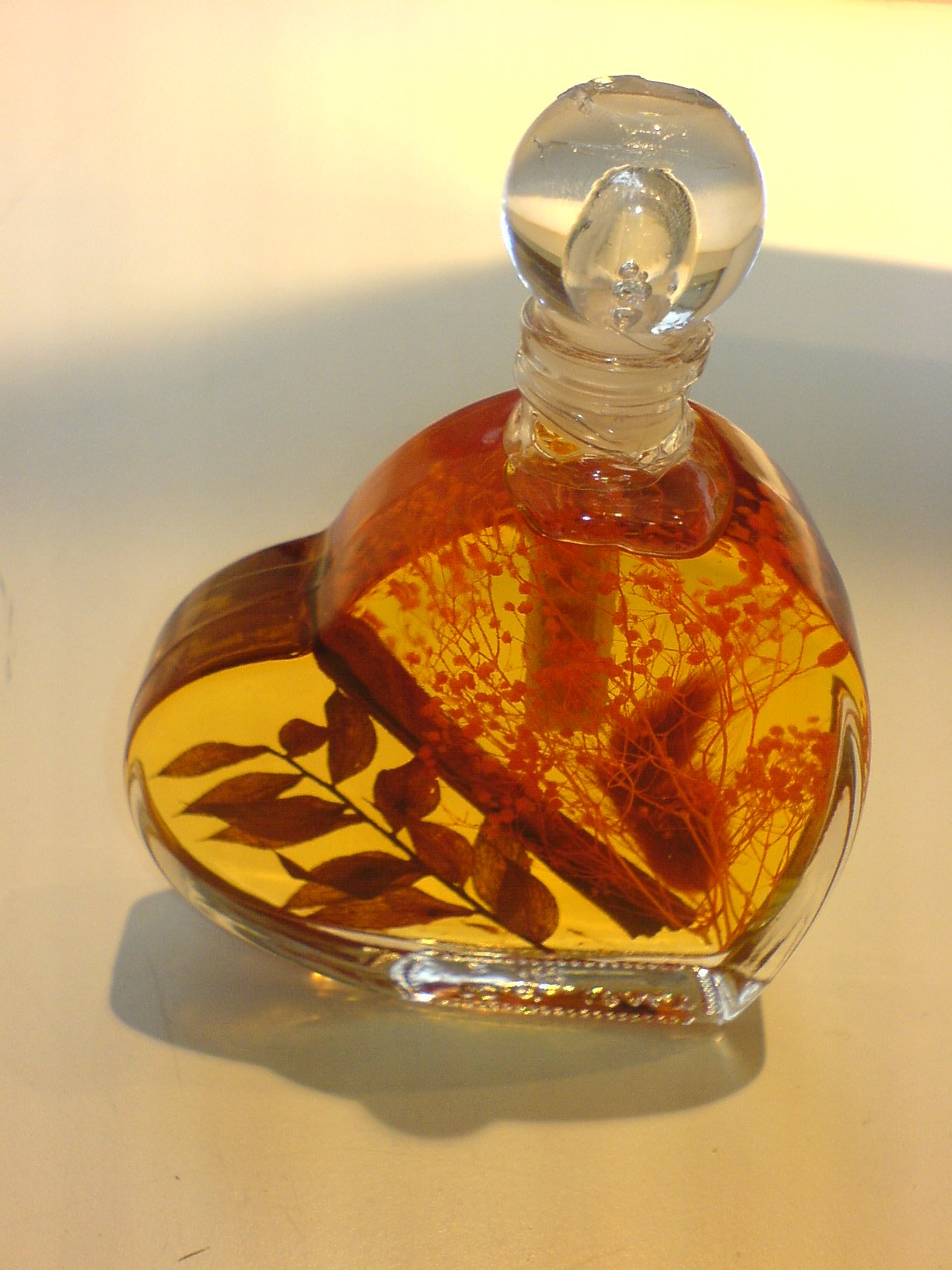 Badeöl mit Kräutern und Blättern in einer Glasflasche.